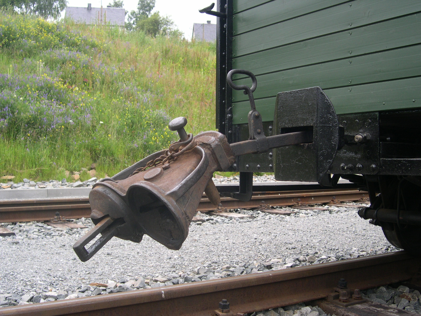 Kupplungsadapter Trichterkupplung auf Scharfenbergkupplung